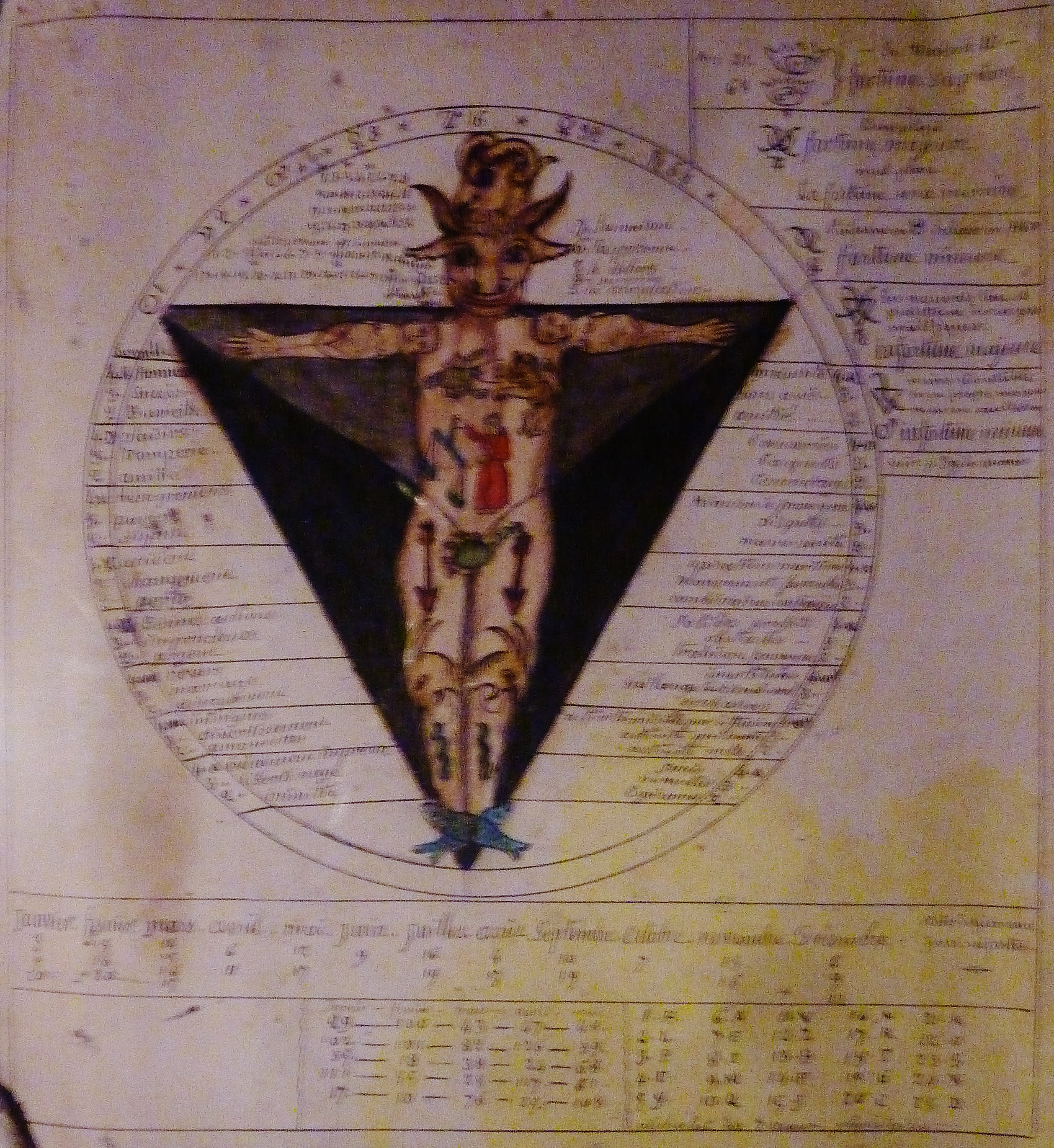 Tableau pour servir à l'étude de l'astrologie et de la géomancie (par le Mage Edmond). Cette représentation s'inscrit dans une très vieille tradition selon laquelle le zodiaque tout entier s'inscrit dans l'ensemble du corps humain, chaque constellation gouvernant une partie spécifique.